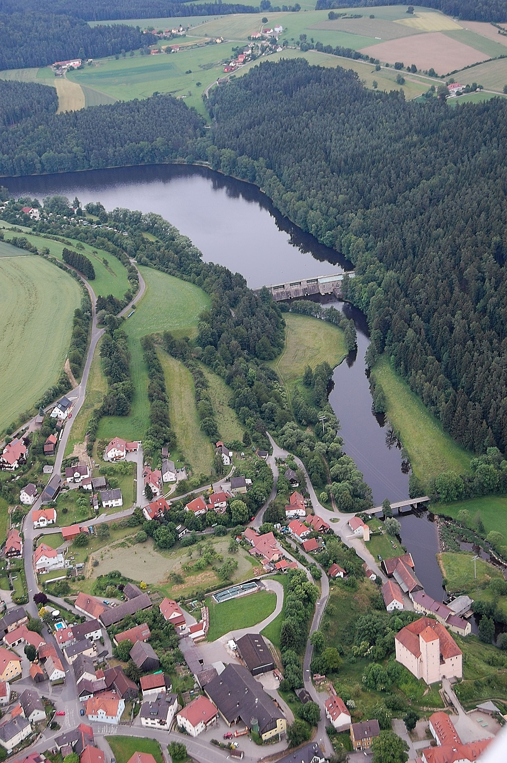 Trausnitz im Tal mit Stausee Trausnitz und Laufwasserkraftwerk Trausnitz, am oberen Bildrand Bierlhof und Oberpierlhof, Fluss Pfreimd